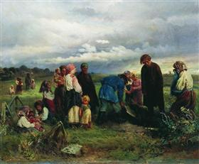 Work by Konstantin Makovsky